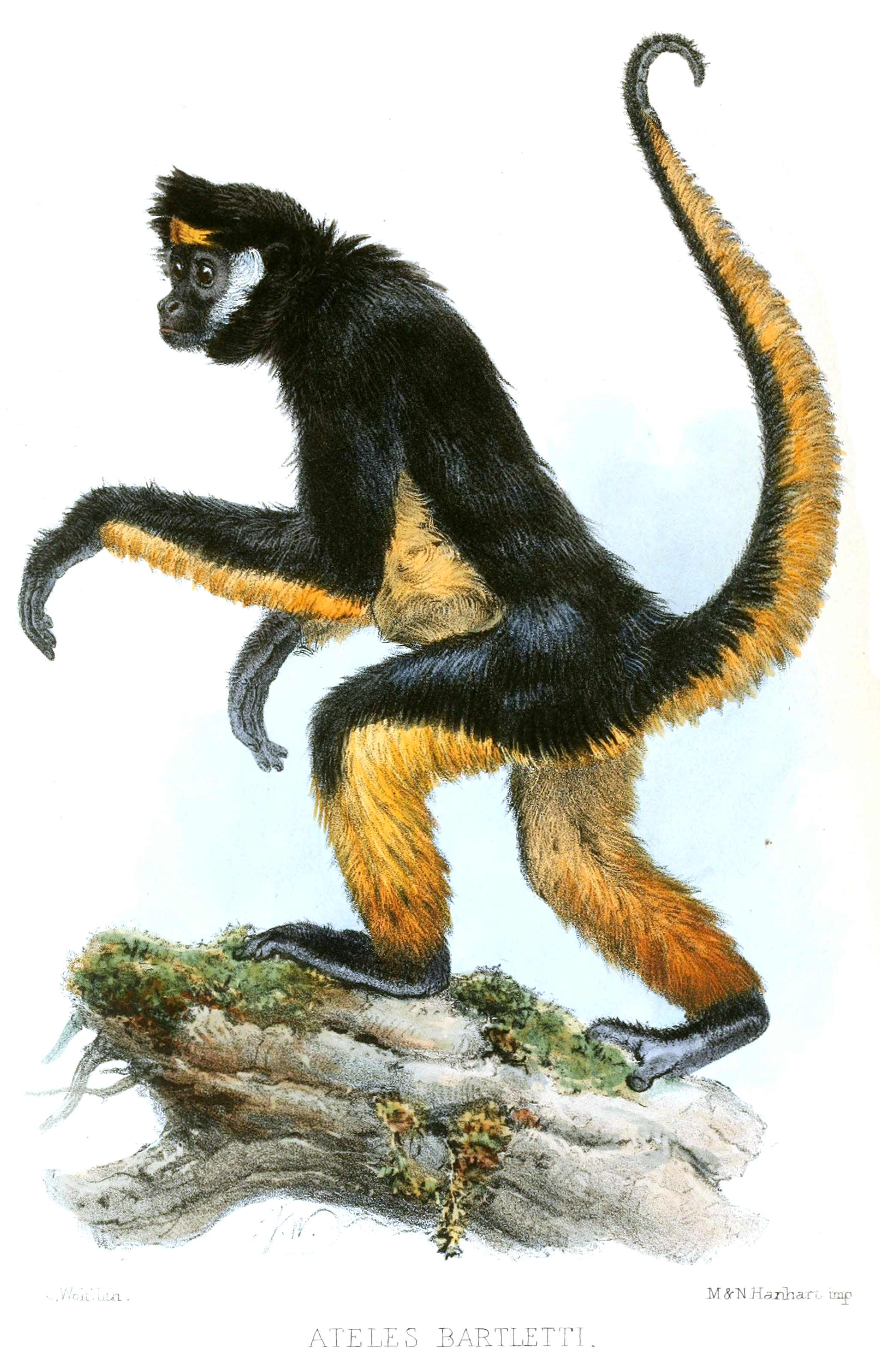 Ateles bartletti = Ateles belzebuth